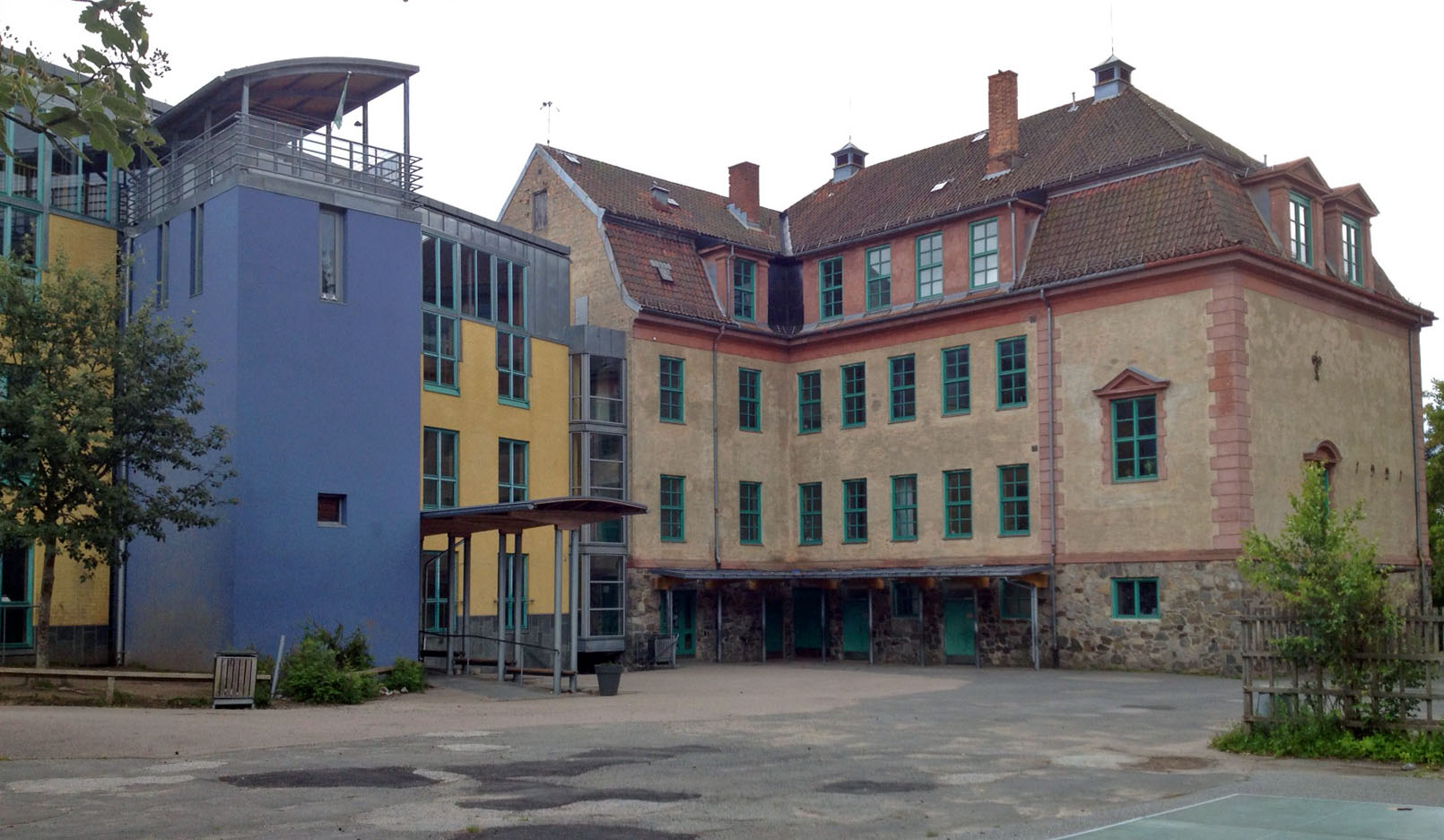 Kolbotn skole, Oppegård